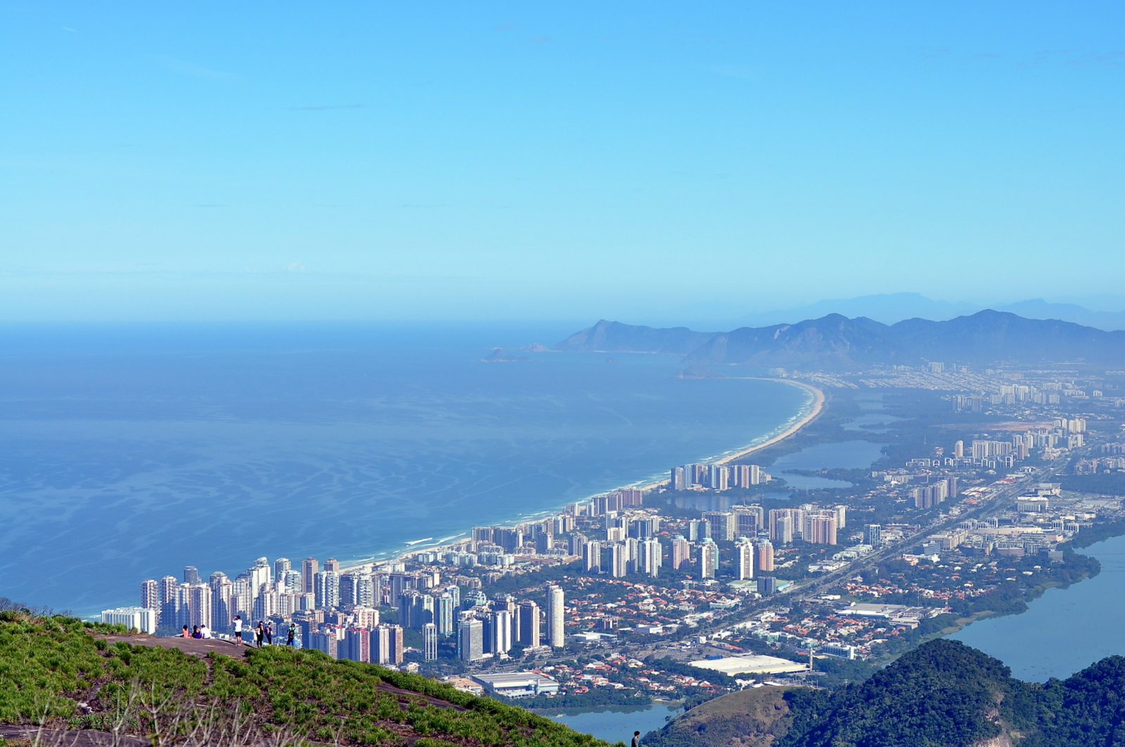 Vista panorâmica da Barra da Tijuca, na cidade do Rio de Janeiro, Brasil.